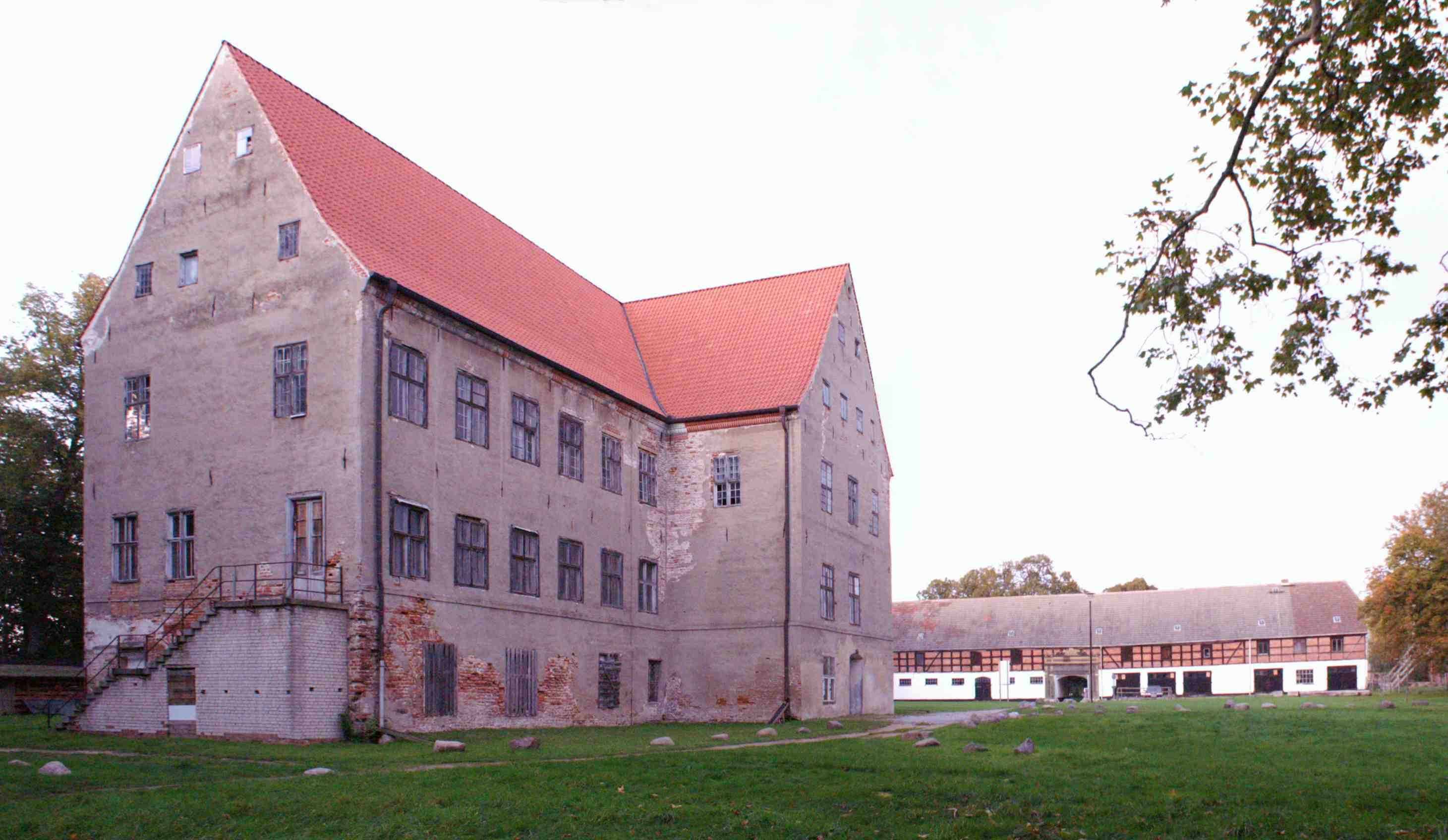 Ludwigsburg - Ostvorpommern - Schloss Ludwigsburg - Gesamtansicht Süd